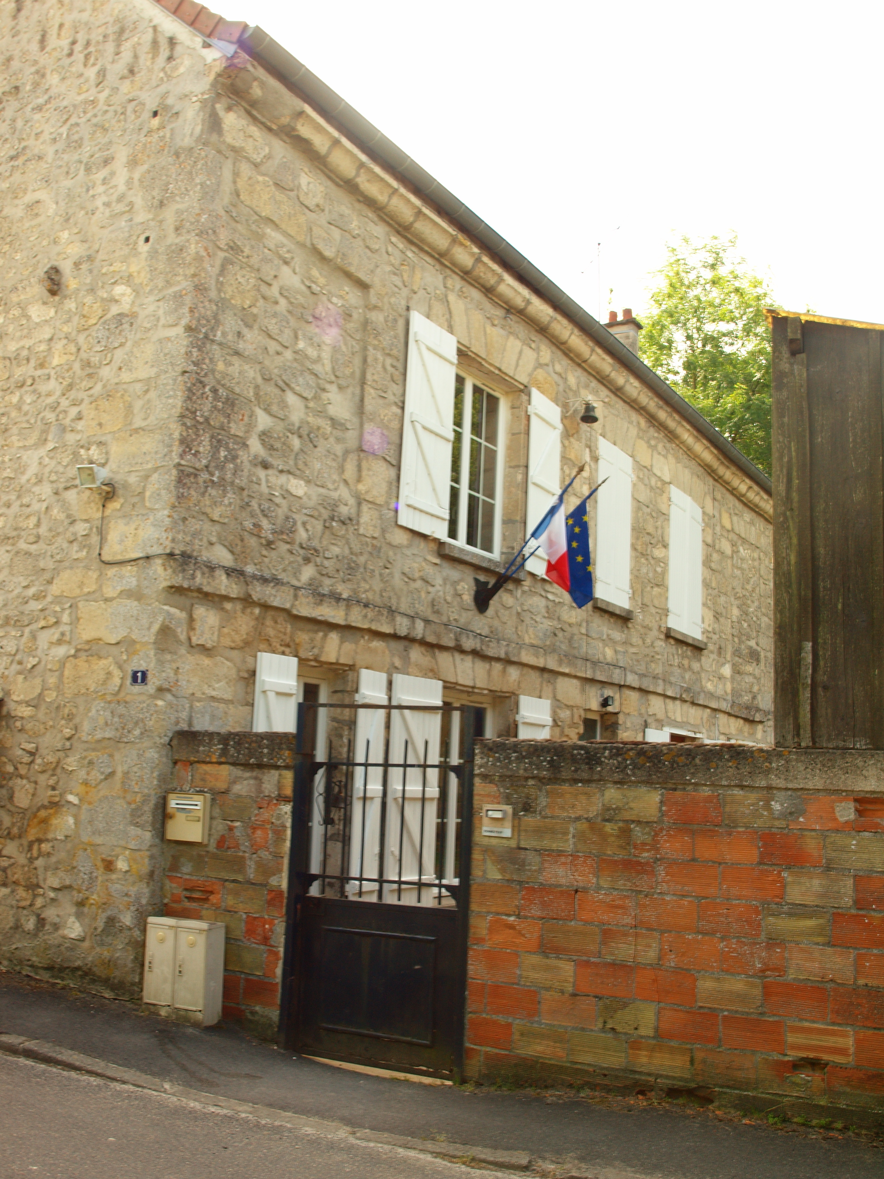 Montgru-Saint-Hilaire (Aisne, France)